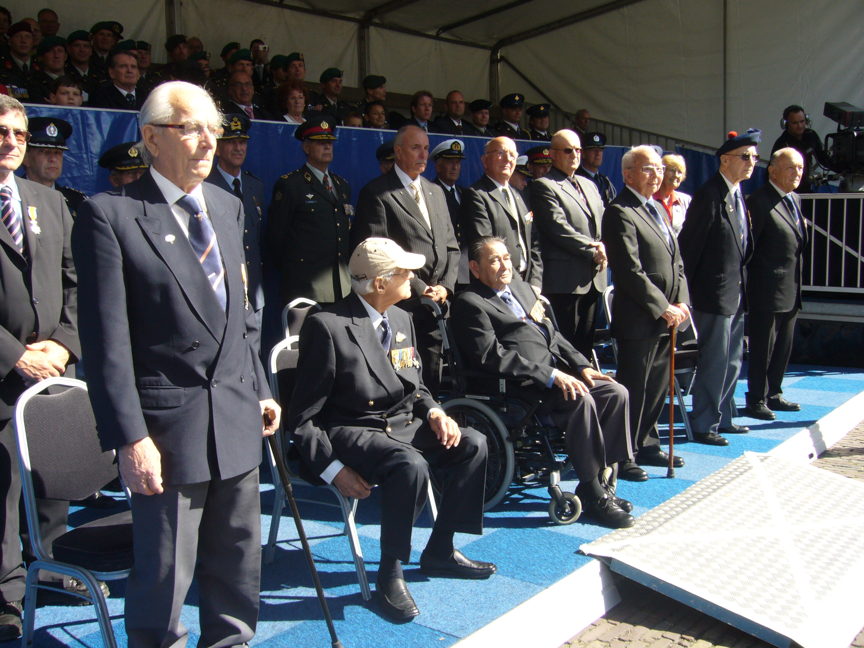 Zes van de 11 nog levende Ridders wonen de uitreiking van de Militaire Willem-Orde aan Marco Kroon bij op het Binnenhof.